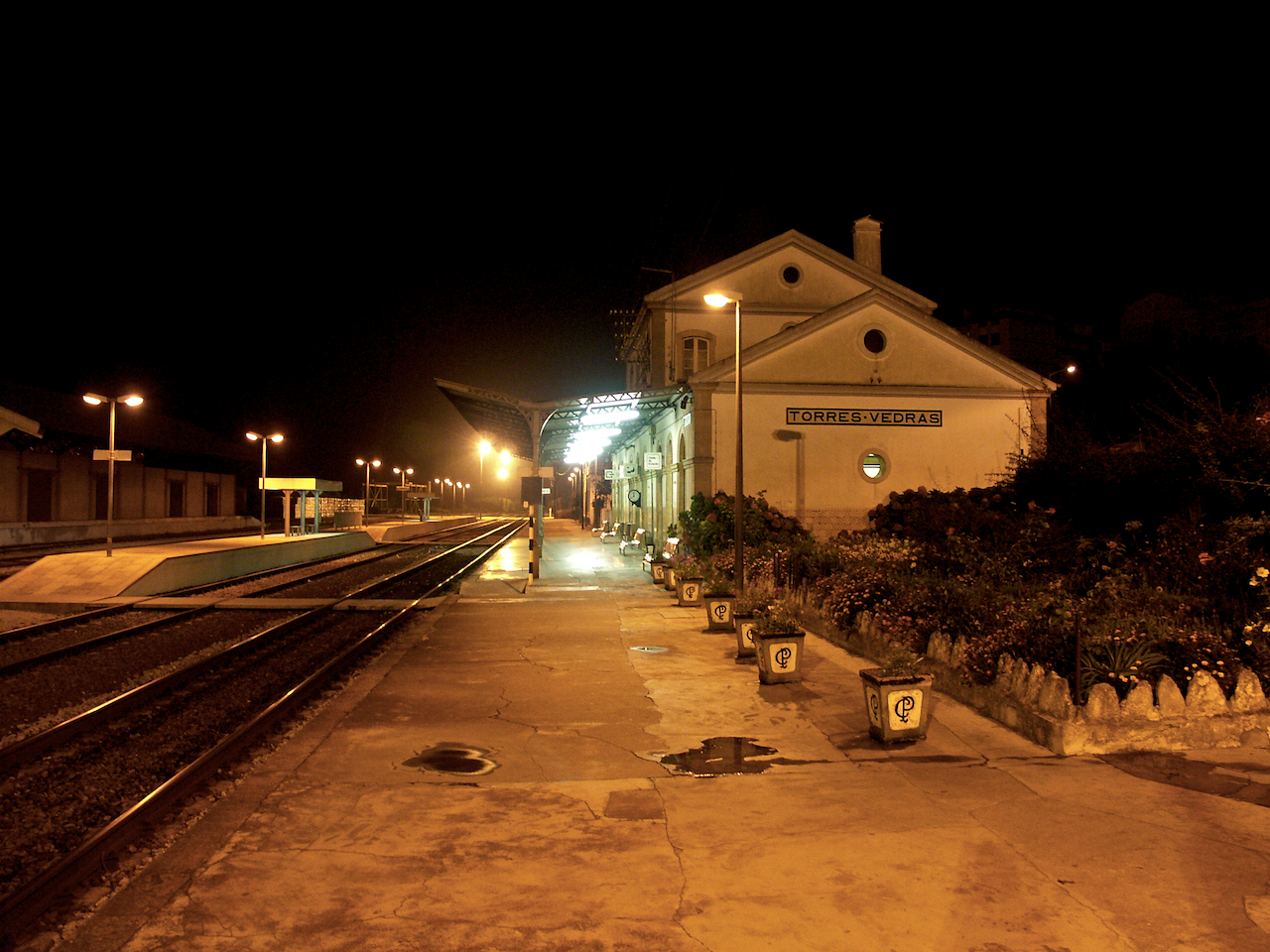 Tipo: E [Estação] Local: Torres Vedras [Linha do Oeste, PK 64] Data e hora: 20 de Setembro de 2004 [23h35]